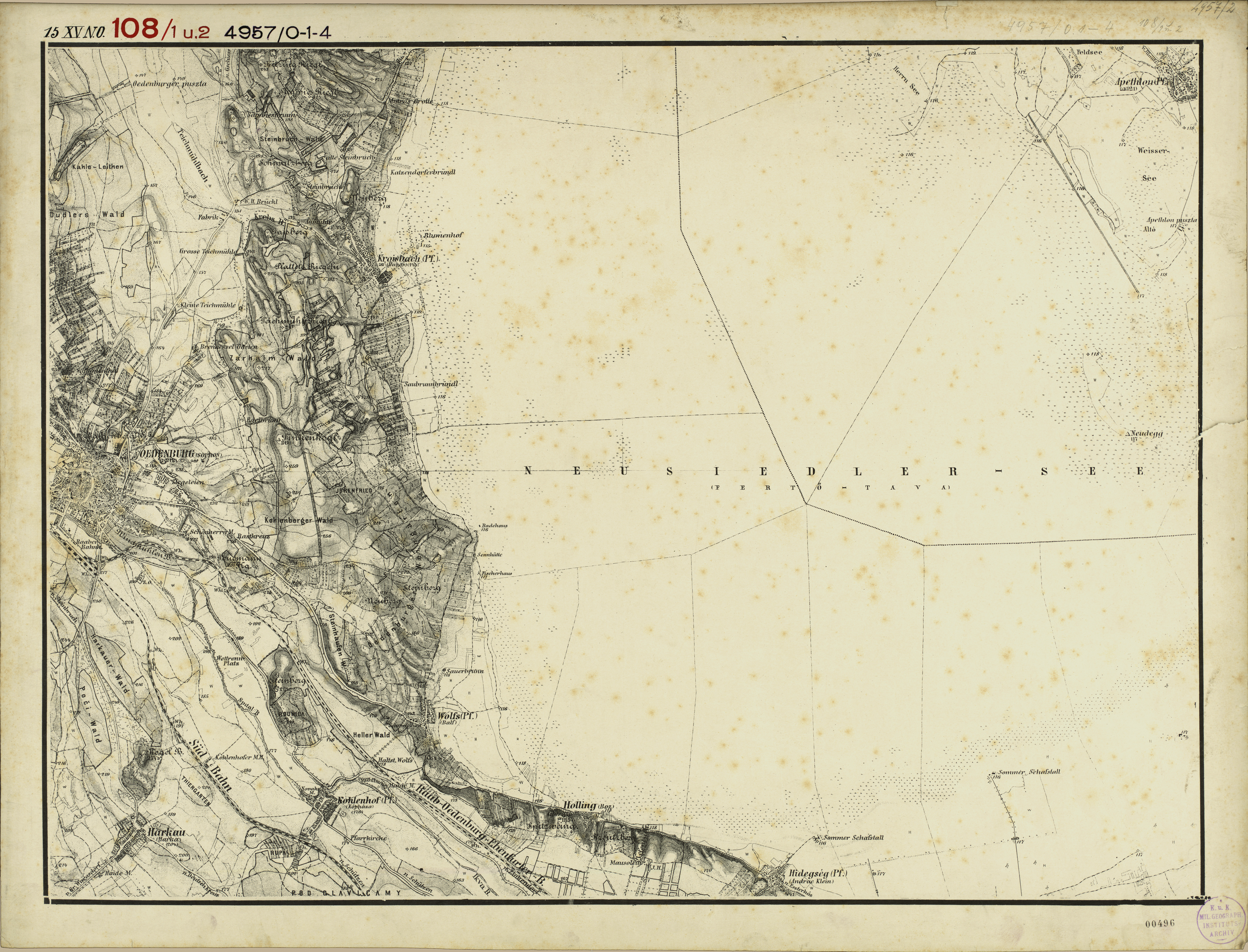 historische Landkarte: Arbeitsfassung von: Gradkartenblatt Zone 15 Colonne XV Section NO (Nordost) (später 4957/2 oder 4957/0-1-4 oder 108/1 und 2). Ödenburg / Sopron, Kroisbach / Rakos, Wolfs / Balf, Kohlenhof / Kophaza, Harkau / Harka, Holling / Boz, Hidegseg / Andrae Klein, Apetholon und südlicher Teil des (damals ausgetrockneten) Neusiedler Sees in Westungarn, später teilweise Seewinkel. Franzisco-josephinische (3.) Landesaufnahme der österreichisch-ungarischen Monarchie. Maßstab 1:25.000. Stand nach begleitenden Angaben um 1881.